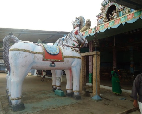 பிடாரி செல்லாண்டியம்மன் கோயில் குதிரை வாகனம் Other information பிடாரி செல்லாண்டியம்மன் கோயில் குதிரை வாகனம்